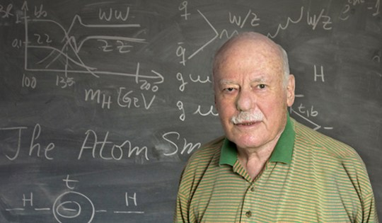 פרופסור לפיזיקה צבי ליפקין